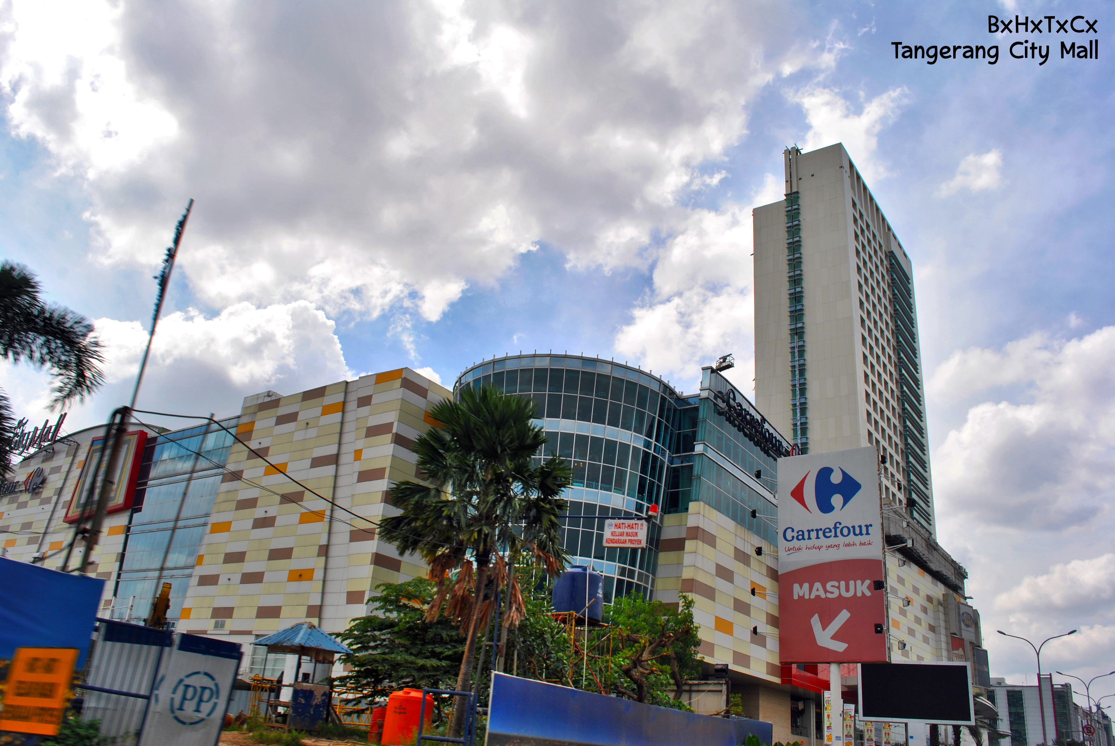 Mall Tangerang City